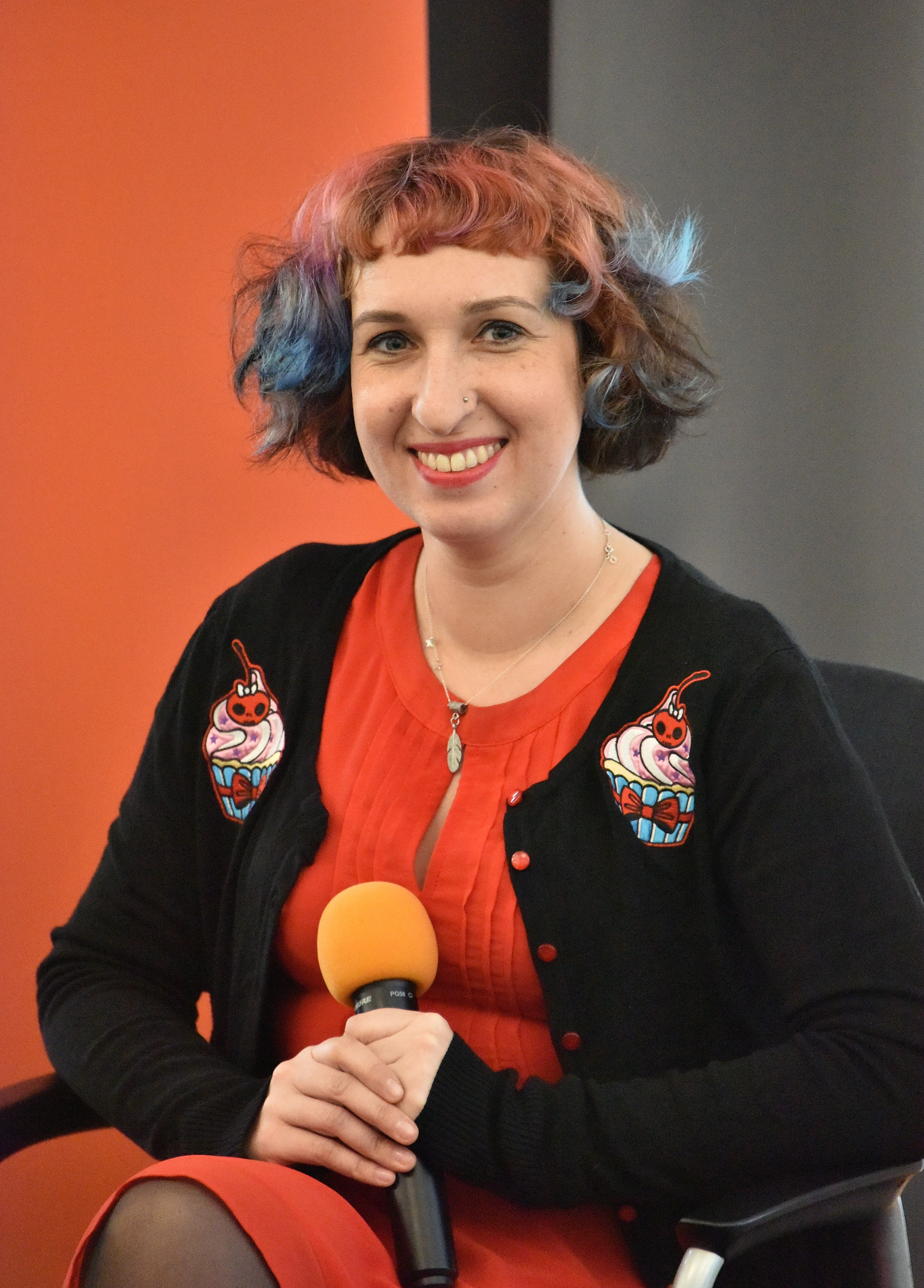 Sylwia Chutnik podczas dnia otwartego z Rzecznikiem Praw Obywatelskich "Otwarci na Konstytucję" w siedzibie Biura RPO przy ul. Długiej 23/25 w Warszawie